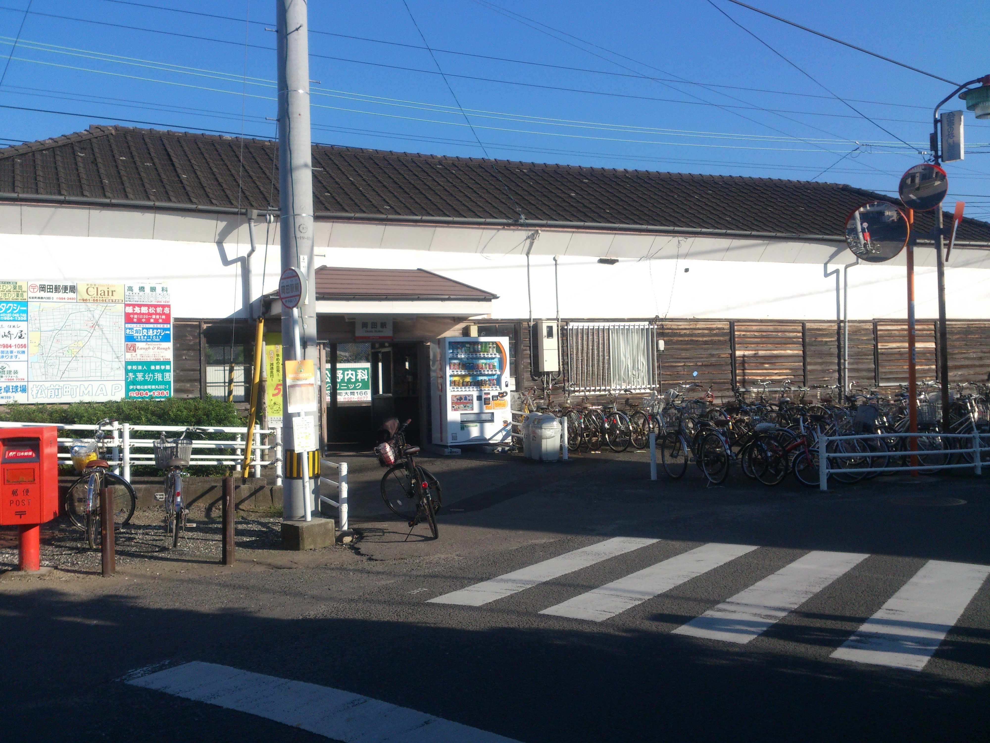 伊予鉄道 岡田駅